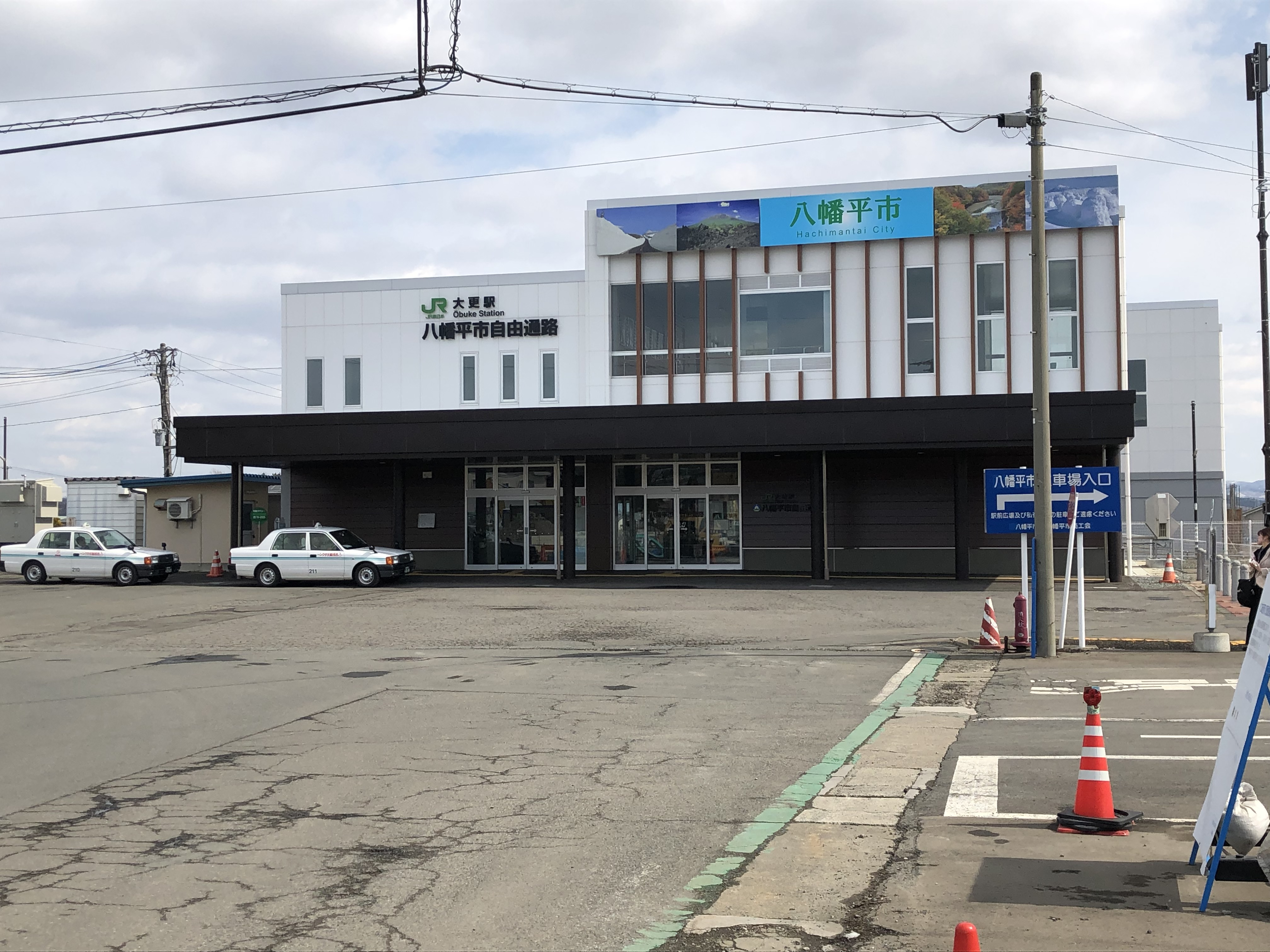 JR大更駅の新駅舎。2019年3月19日，大更駅周辺にて撮影。